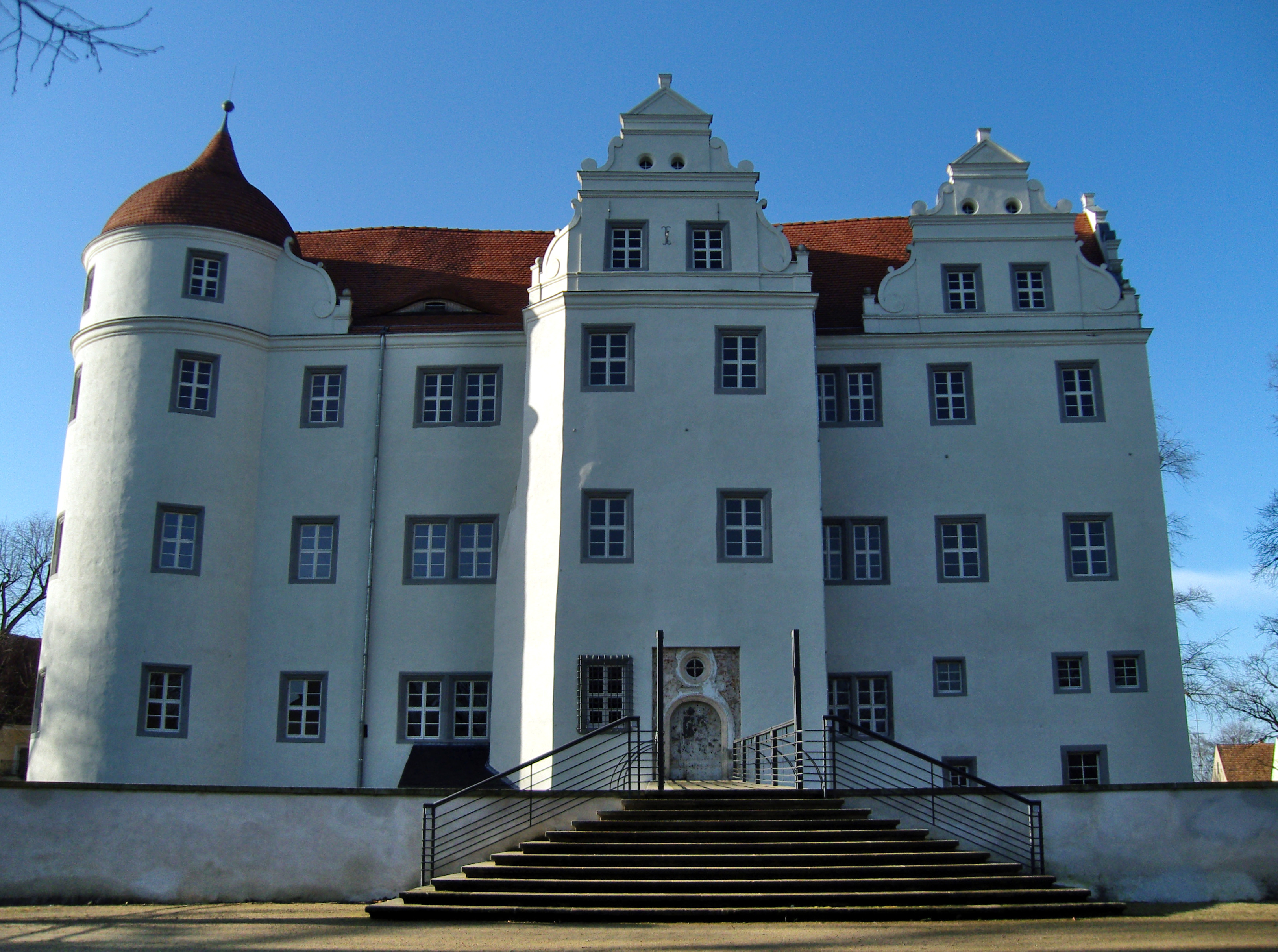 Schloss in Großkmehlen, Frontseite